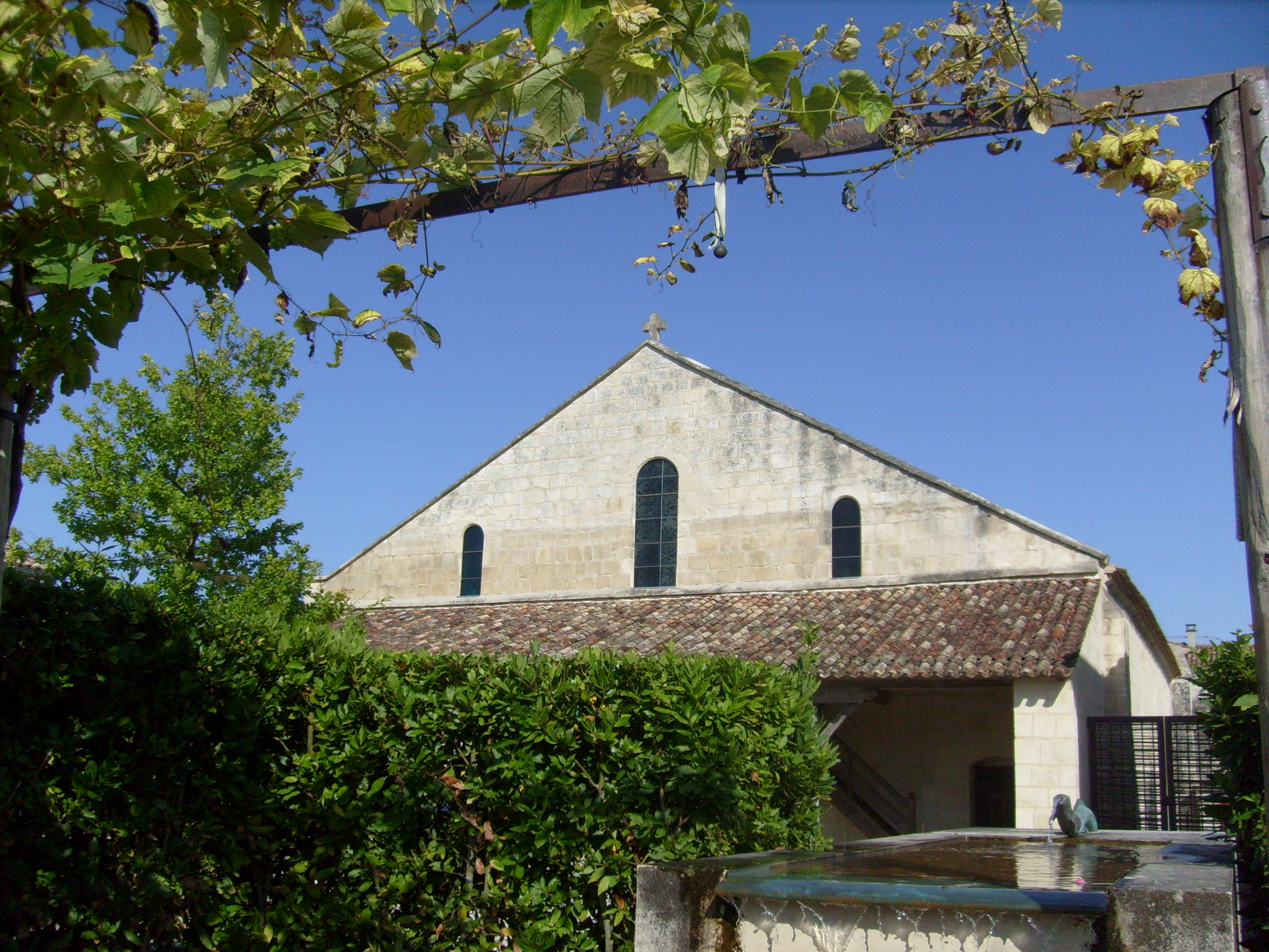 Jardins de l'hospice des pèlerins à Pons